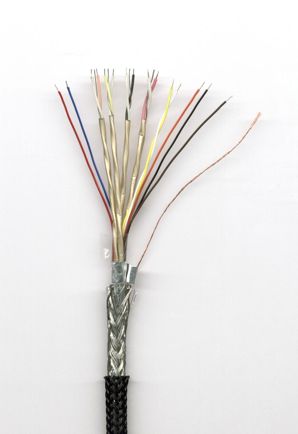 Изображение HDMI кабеля